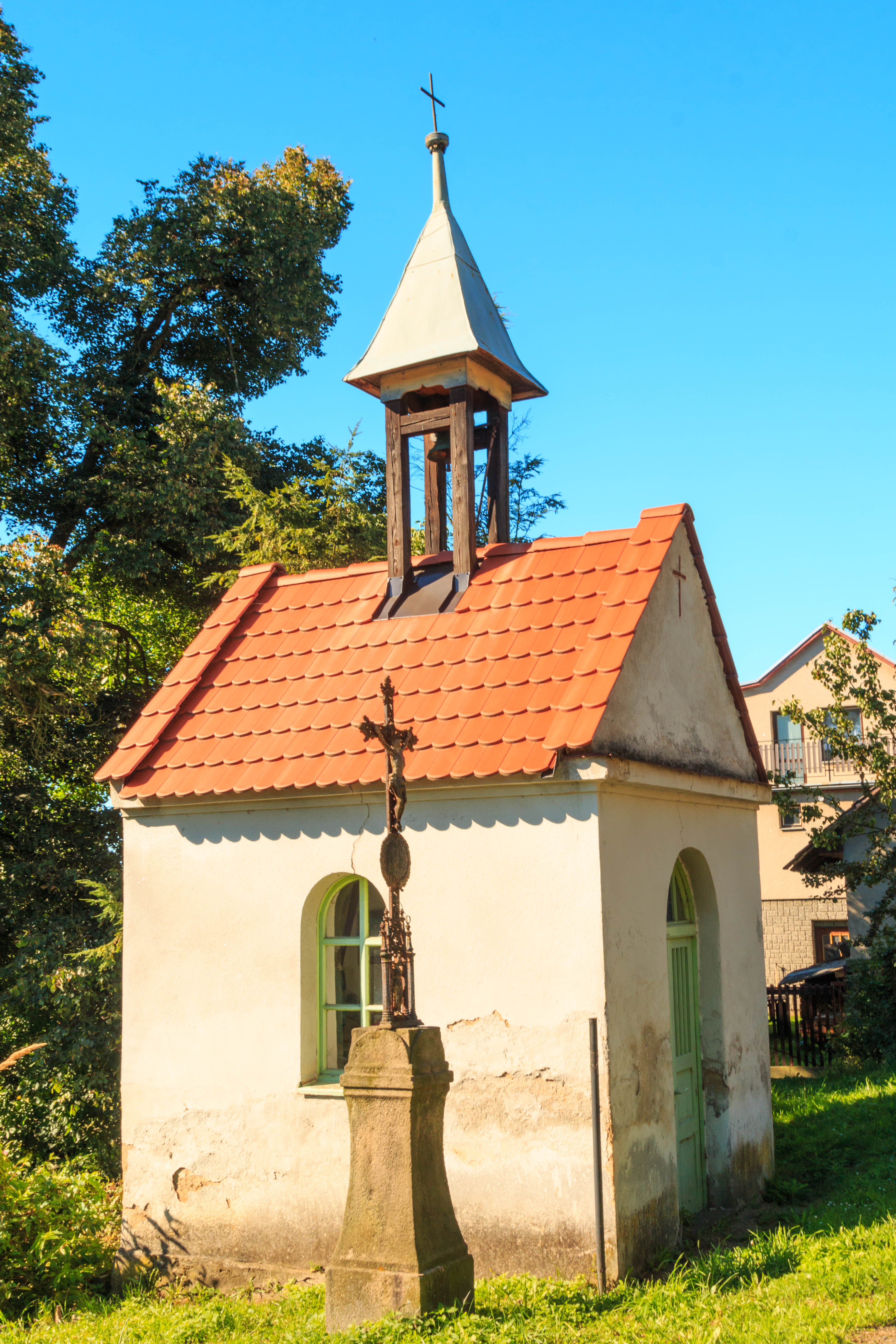 Souboř - křížek a kaple